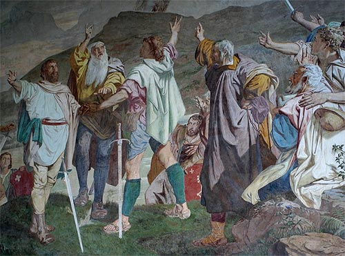 Fresko "Rütlischwur" in der Tellskapelle (Nr. 03.1-8818) Ernst Stückelberg (1831–1903) Alternative namesJohann Melchior Ernst StickelbergerDescription Swiss painter Date of birth/death21 February 183114 September 1903Location of birth/deathBaselidemWork locationBern, Antwerp, Munich, Rome, Zurich, Basel, Sisikon UR (Urnersee)Authority control VIAF: 74648745 LCCN: nr95005764 GND: 118756206 ULAN: 500009186 ISNI: 0000 0001 1071 1613 WorldCat